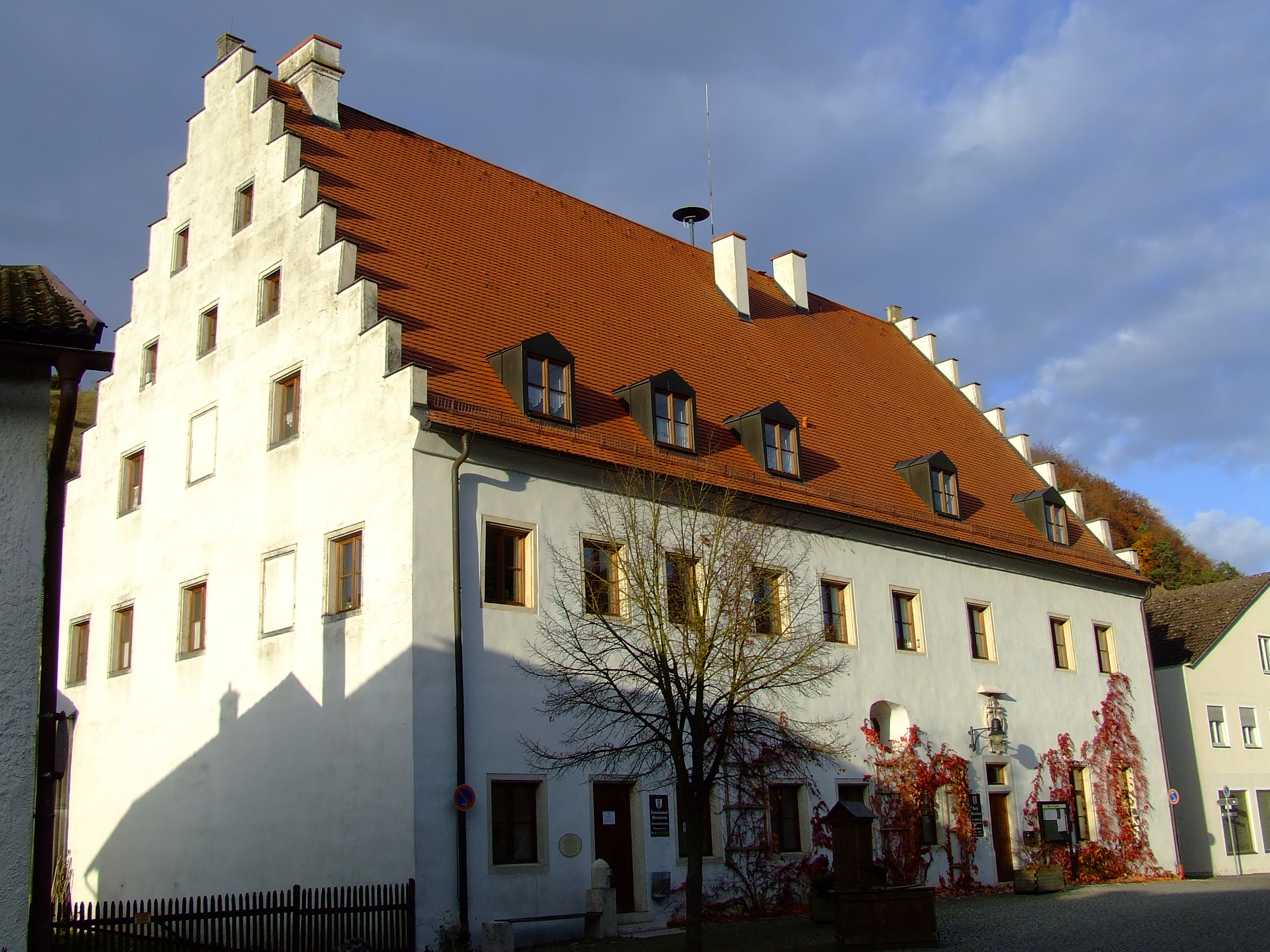 Kastenhof Mörnsheim, Rathaus der Marktgemeinde